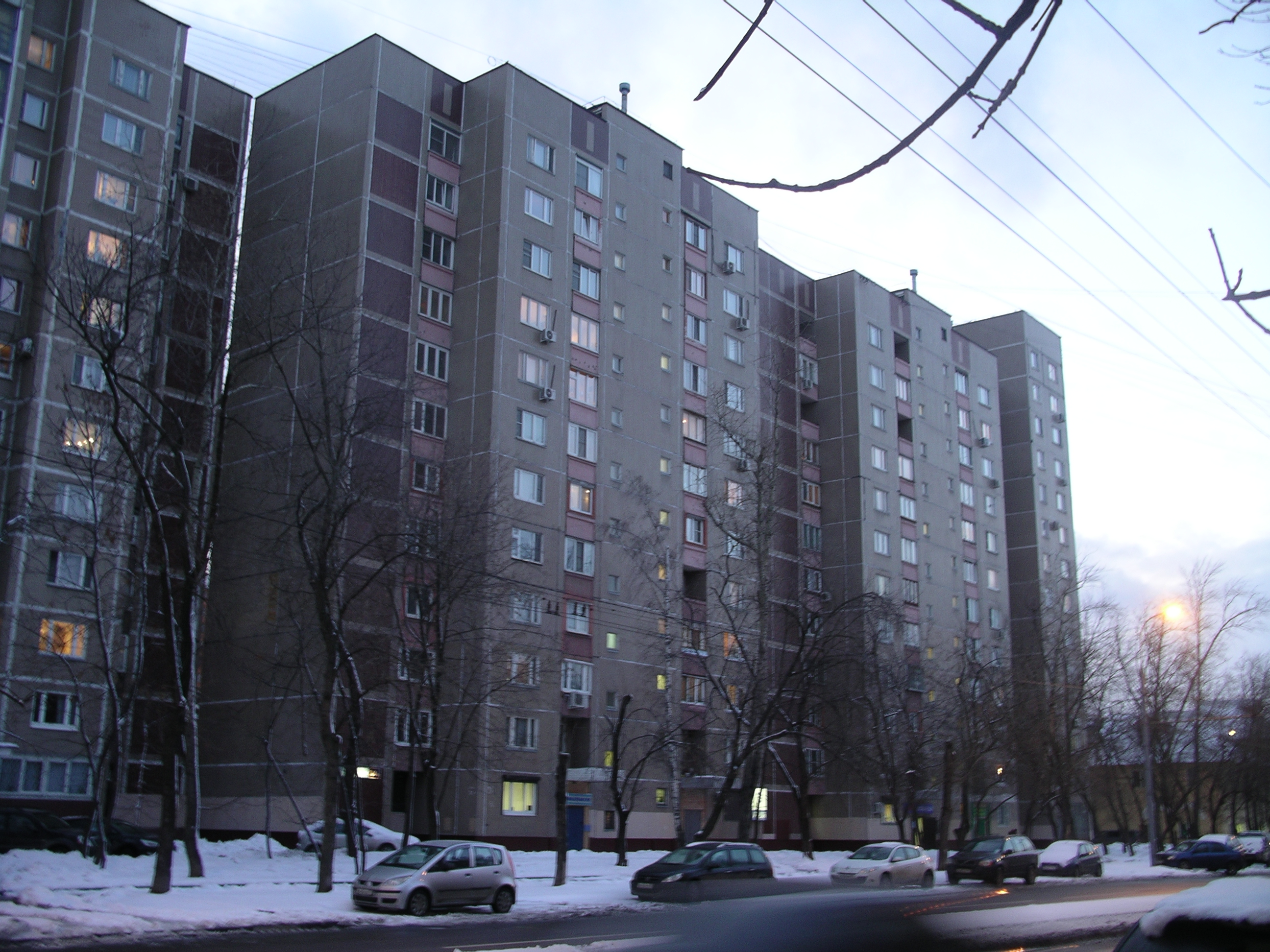 Восьмой микрорайон Перово. Москва.